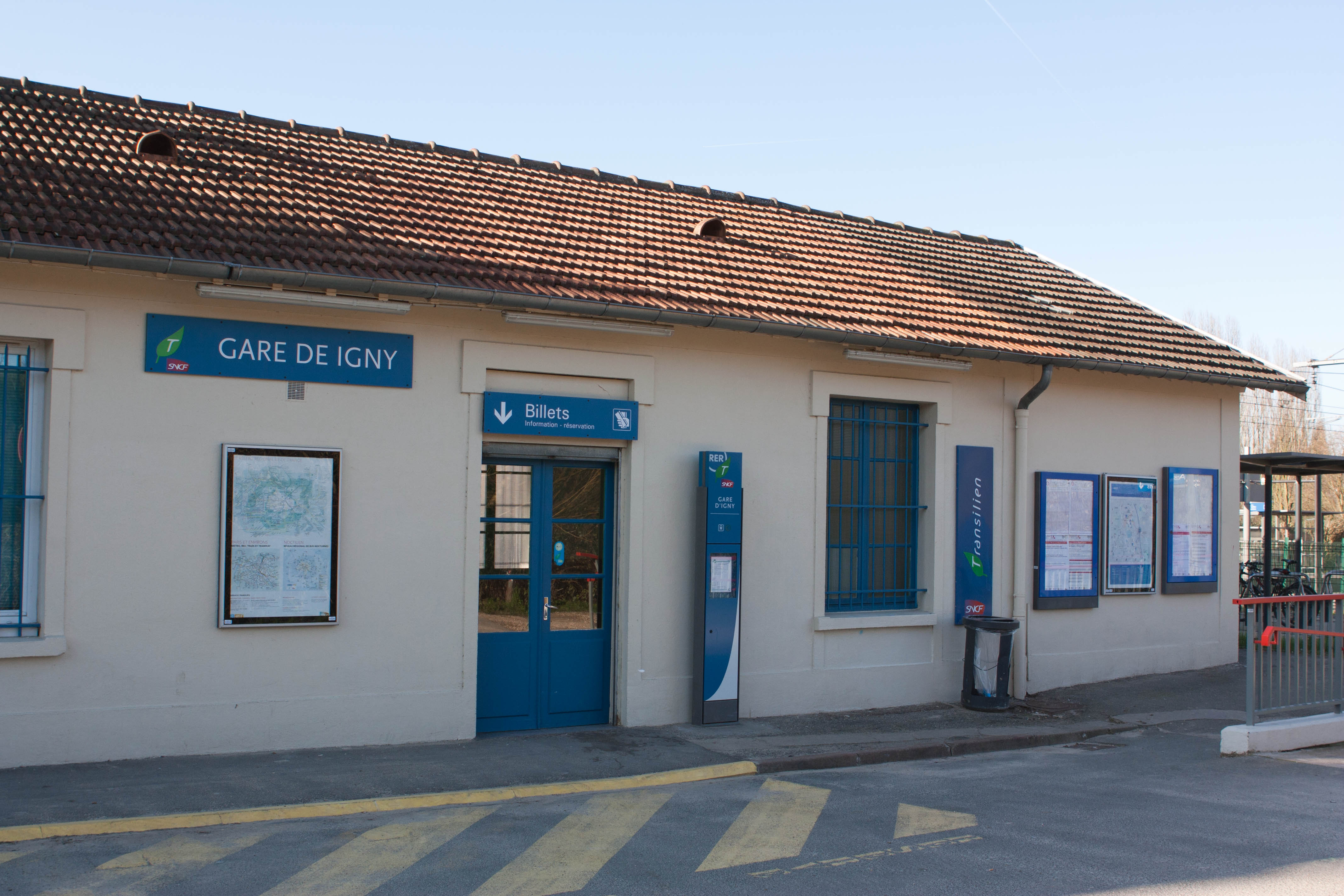 Gare d'Igny, Ligne C du RER, Igny, Essonne, France